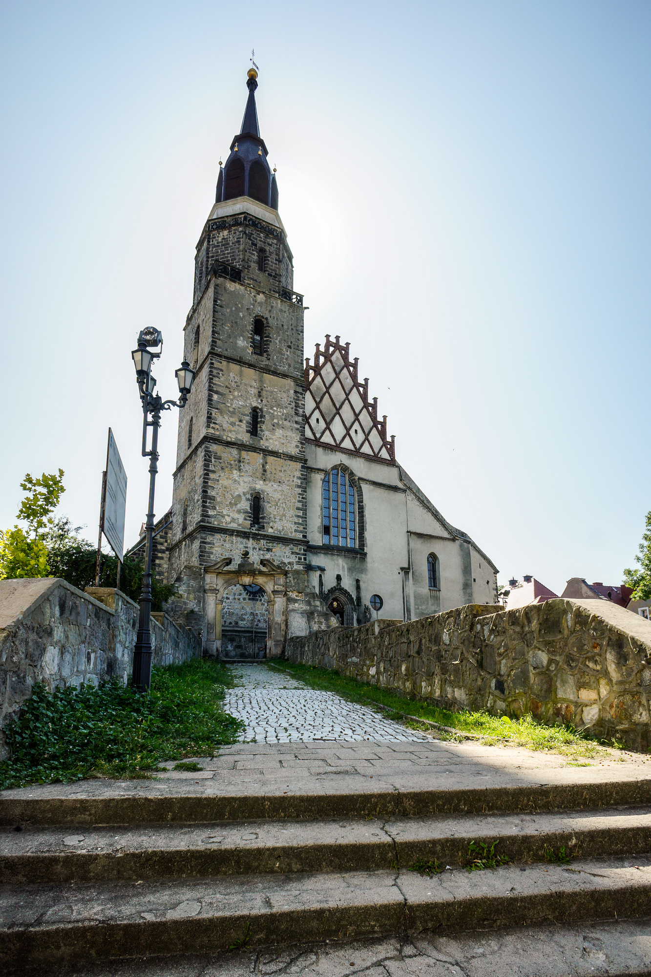 Sanktuarium Wniebowziętej Matki Kościoła w Bolesławcu.